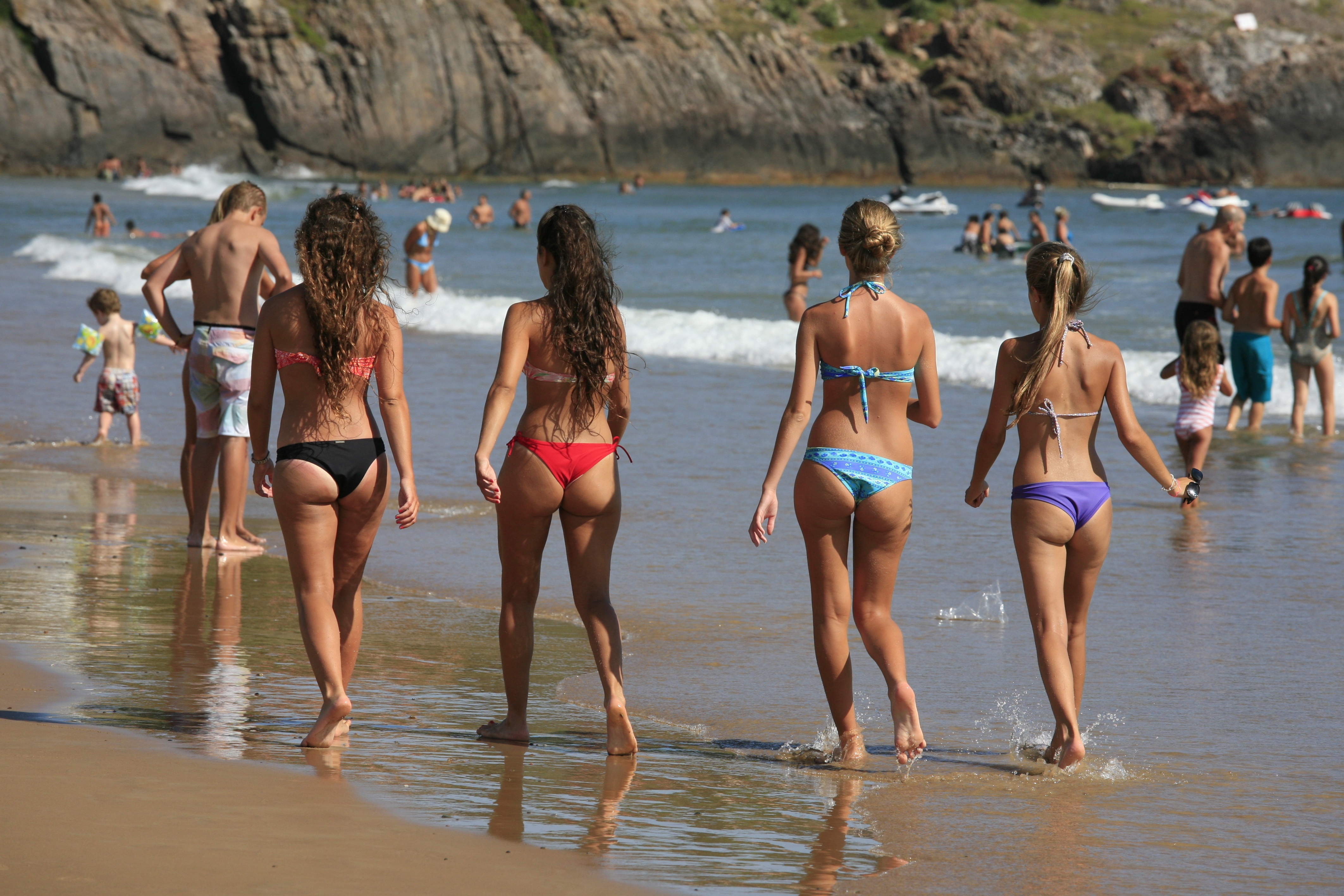 Strutting